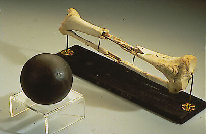 General Sickes knuste ben og kanonkuglen der gjorde det.